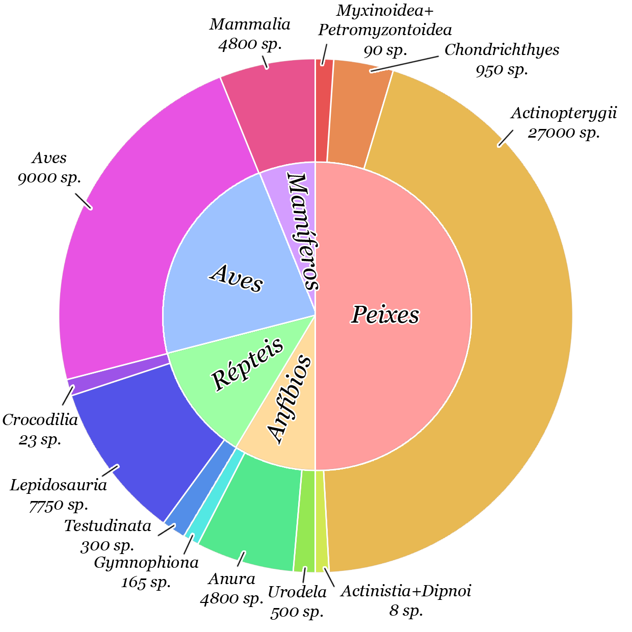 Diagrama com a diversidade de vertebrados com números aproximados de espécies em cada grupo, baseado no livro "A Vida dos Vertebrados". No círculo interno estão os nomes comuns e no círculo externo aparecem os nomes formais dos grupos. Pode-se ver a proporção de cada grupo em relação ao todo.